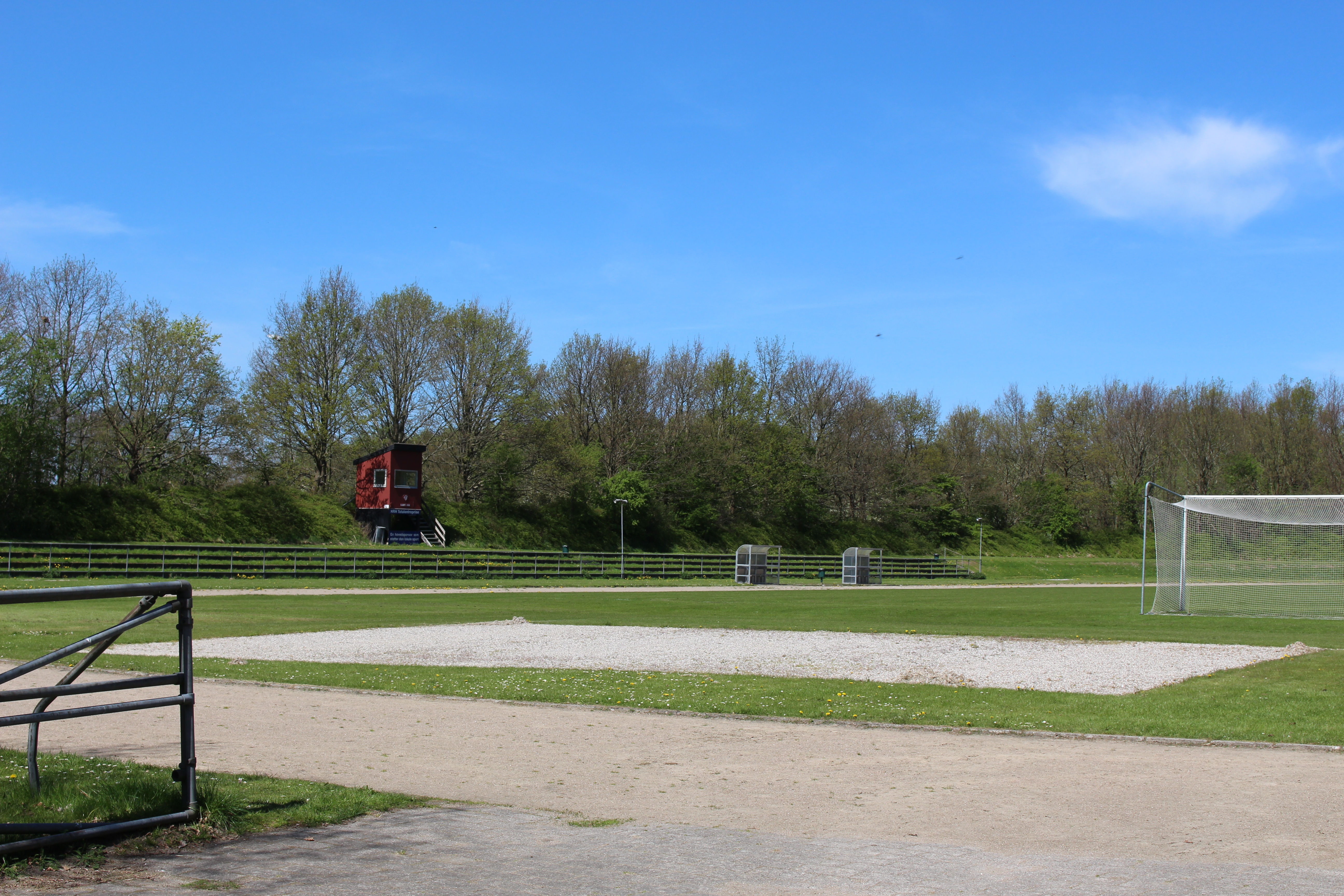 Albert Park på Albertslund Stadion